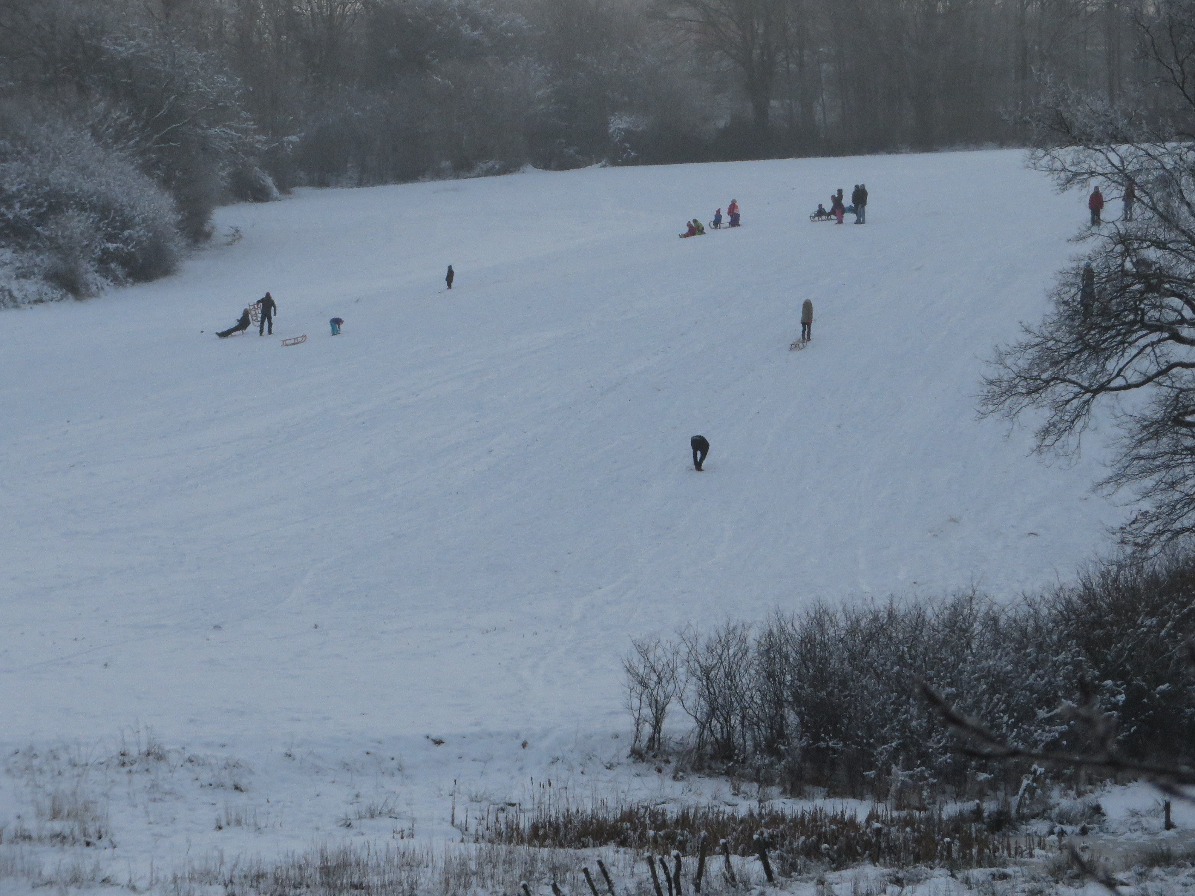 Rodelhänge des Osbektals (Flensburg-Mürwik), Januar 2015, Bild 06